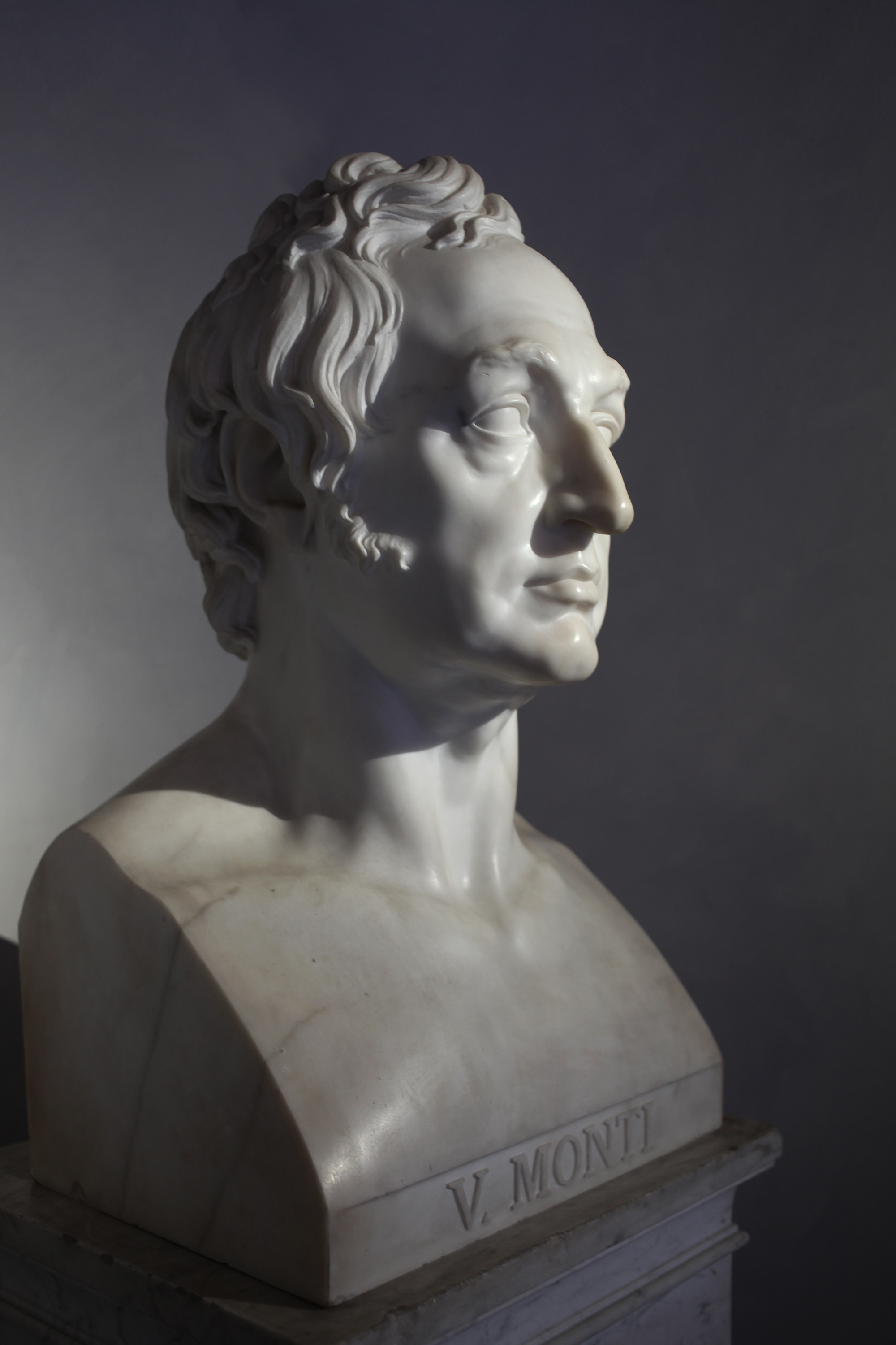 Abbondio Sangiorgio (1798-1879) Erma colossale di Vincenzo Monti (1833), marmo; deposito Pinacoteca di Brera, 1902. Fotografata alla mostra Canova, i volti ideali, Galleria d'Arte Moderna di Milano 2019-2020. Il busto, circa due volte la dimensione naturale, è copia dell'originale in bronzo del 1833 che componeva un cenotafio al Monti progettato da Pelagio Palagi, modellato da Sangiorgio e gettato in bronzo da Luigi Manfredini e posto nel loggiato del palazzo di Brera. Il busto in marmo qui rappresentato fu commissionato, sempre nel 1833, dall'Università di Ferrara